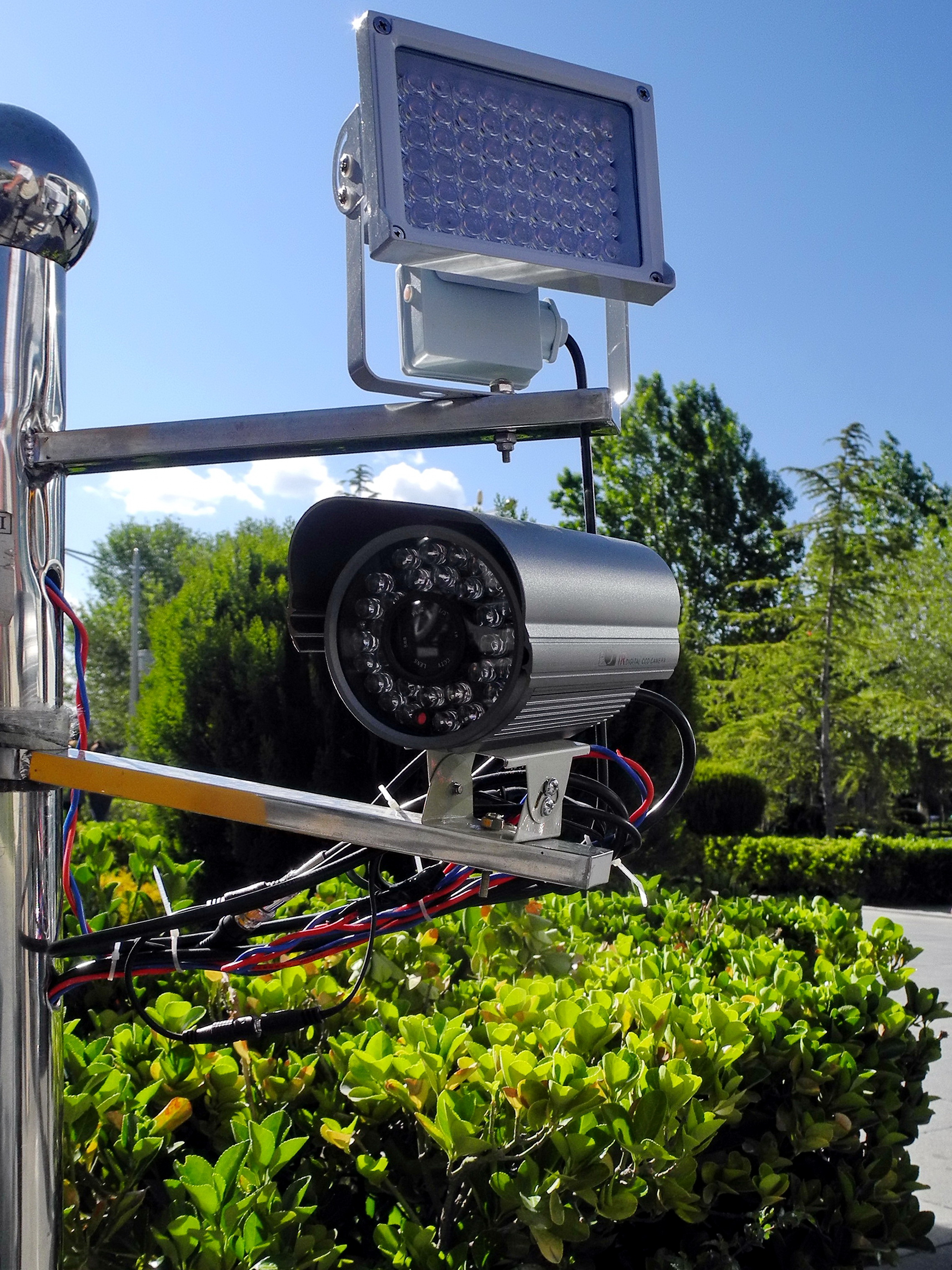 caméra de surveillance électronique à Lhassa (palis d'été)